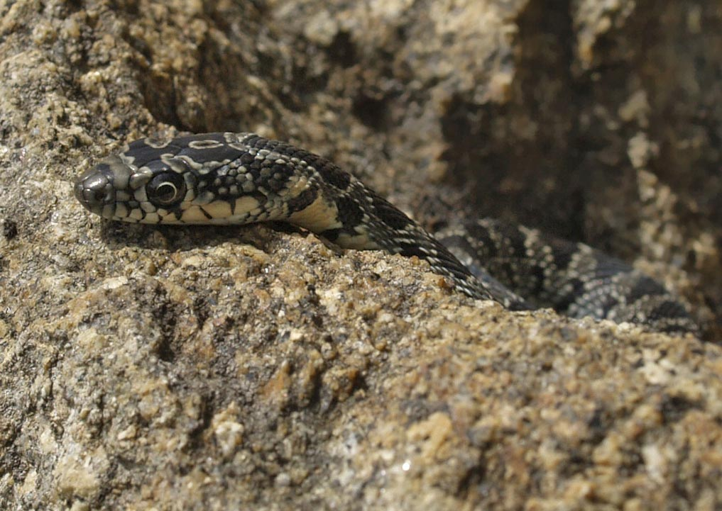 Culebra de herradura (Hemorrhois hippocrepis=Coluber hippocrepis), ejemplar juvenil. Madrigal de la Vera, Cáceres, España.